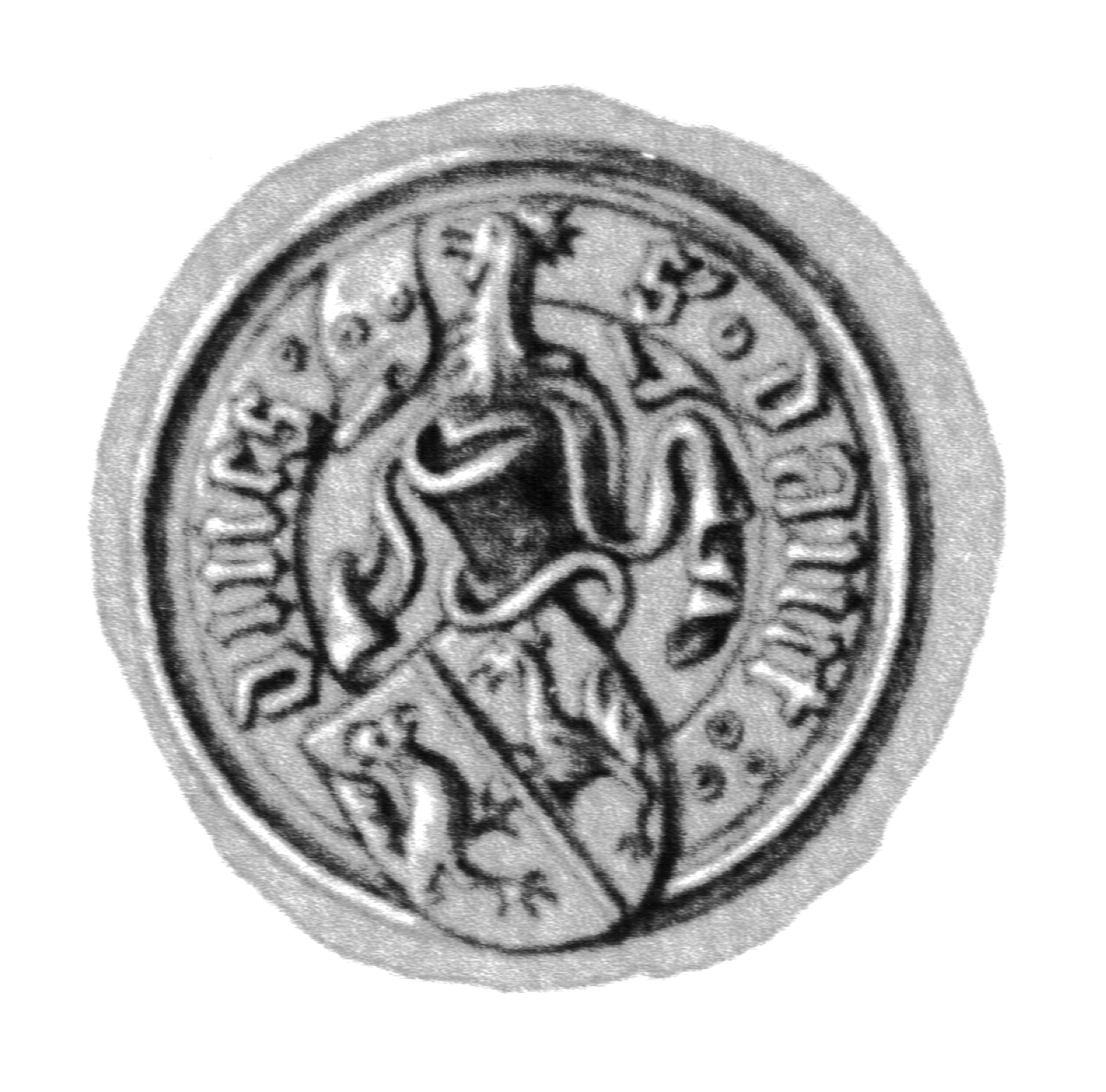 Siegel des Ratsmannes David Divitze(n). Das Siegel stammt aus der Zeit um 1498. Siehe Emil Ferdinand Fehling: Lübeckische Ratslinie, Nr. 581 (David Divessen (Diwitz)).